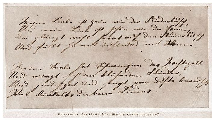 Faksimile des Gedichtes: "Meine Liebe ist grün wieder Fliederbusch"